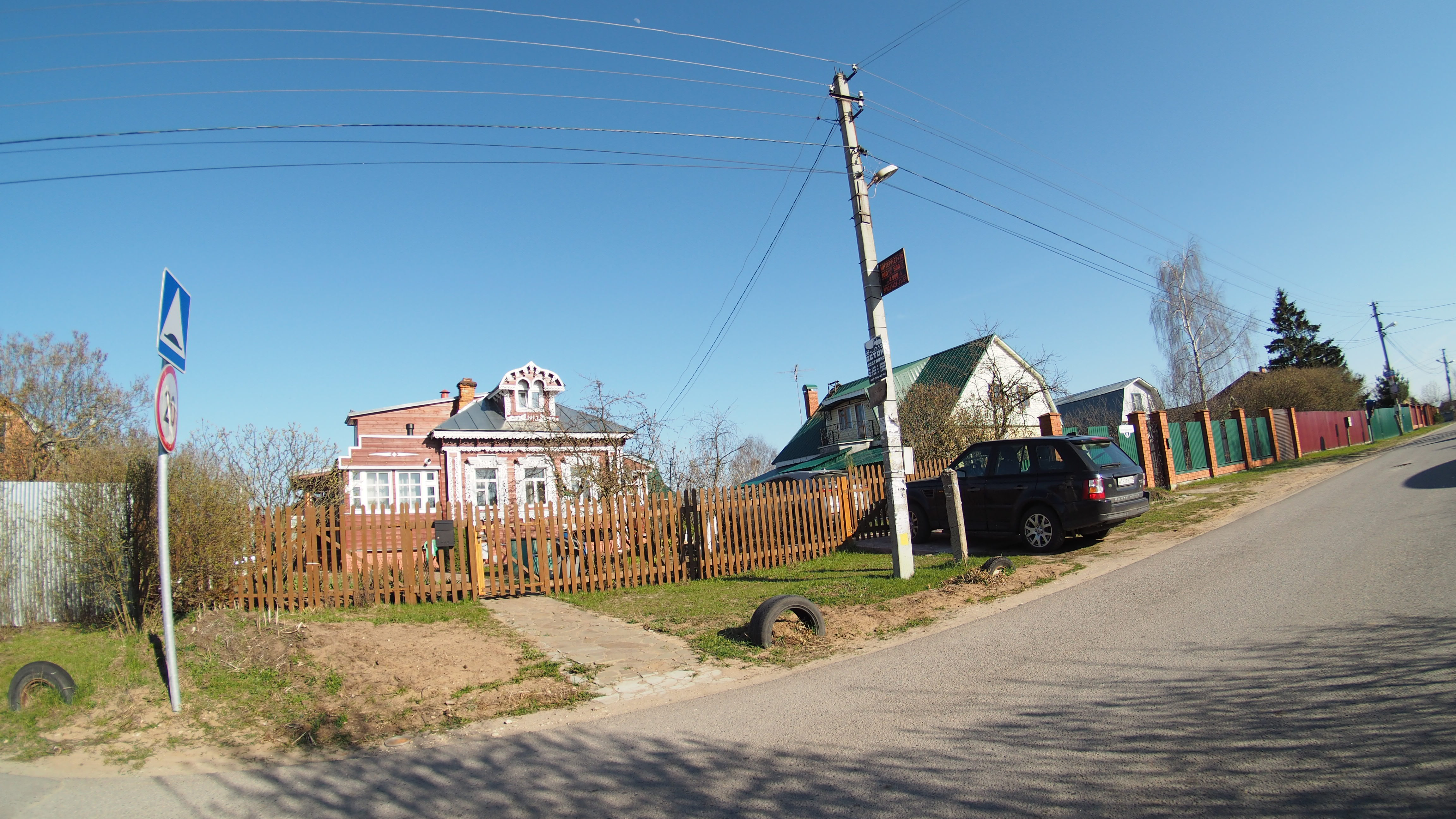 Загорново